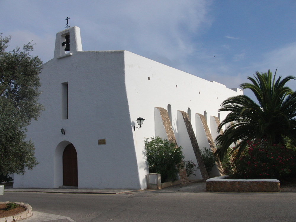 Kirche von Es Cubells an der Plaça Pere Francesc Palau i Riquer, Ibiza; 07.11